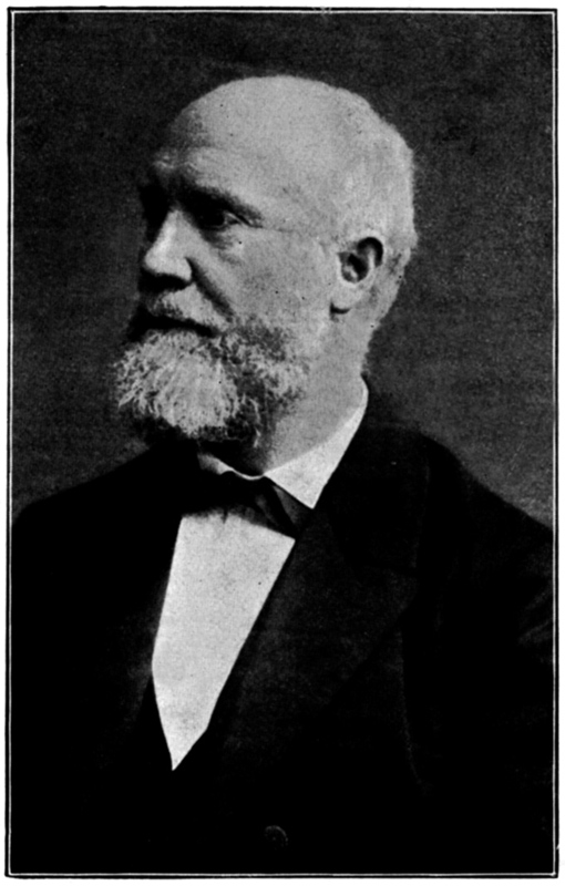 Portrait Ludwig Deppe